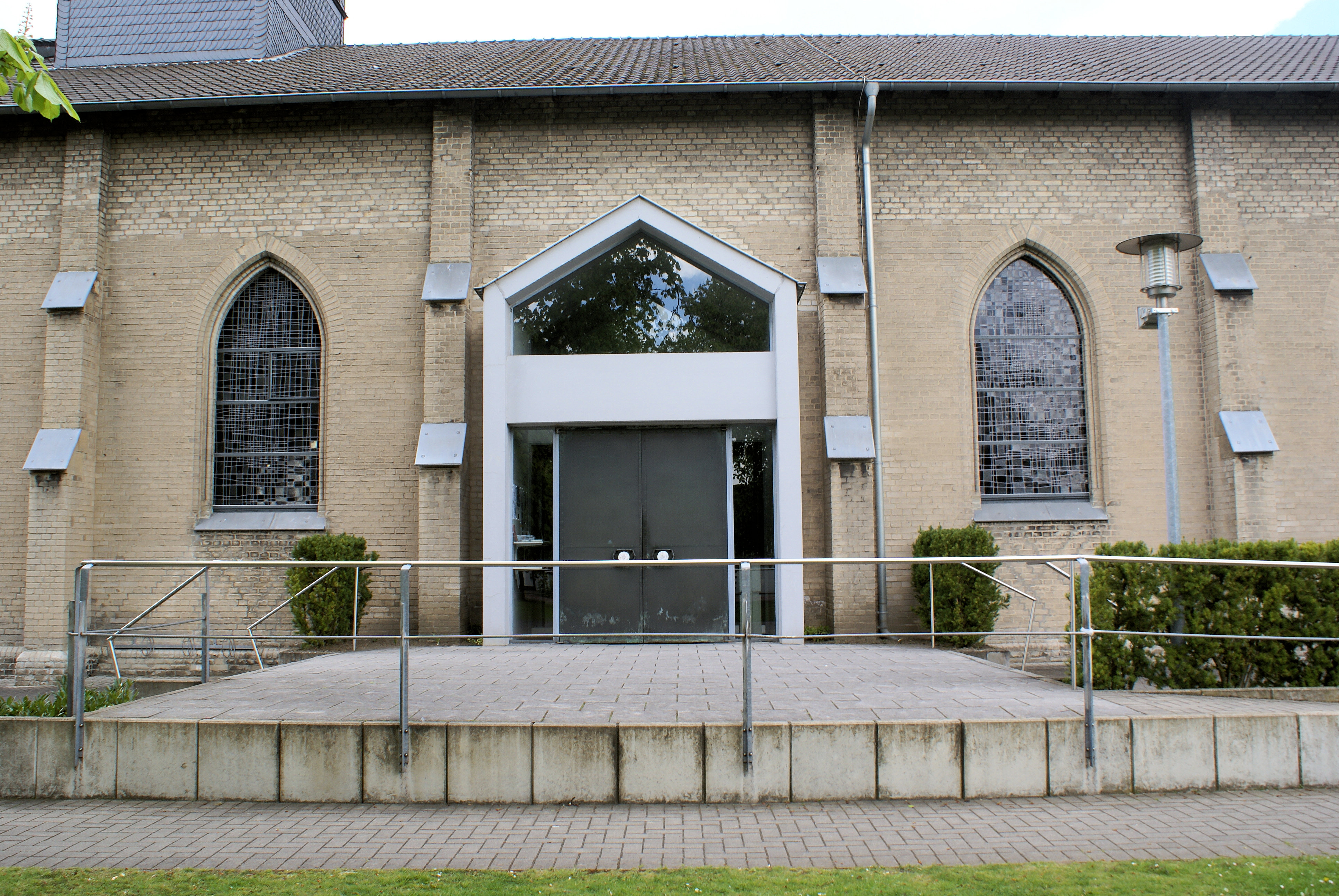 St. Marien in Dorsten-Hervest, Landkreis Recklinghausen, Nordrhein-Westfalen, Deutschland